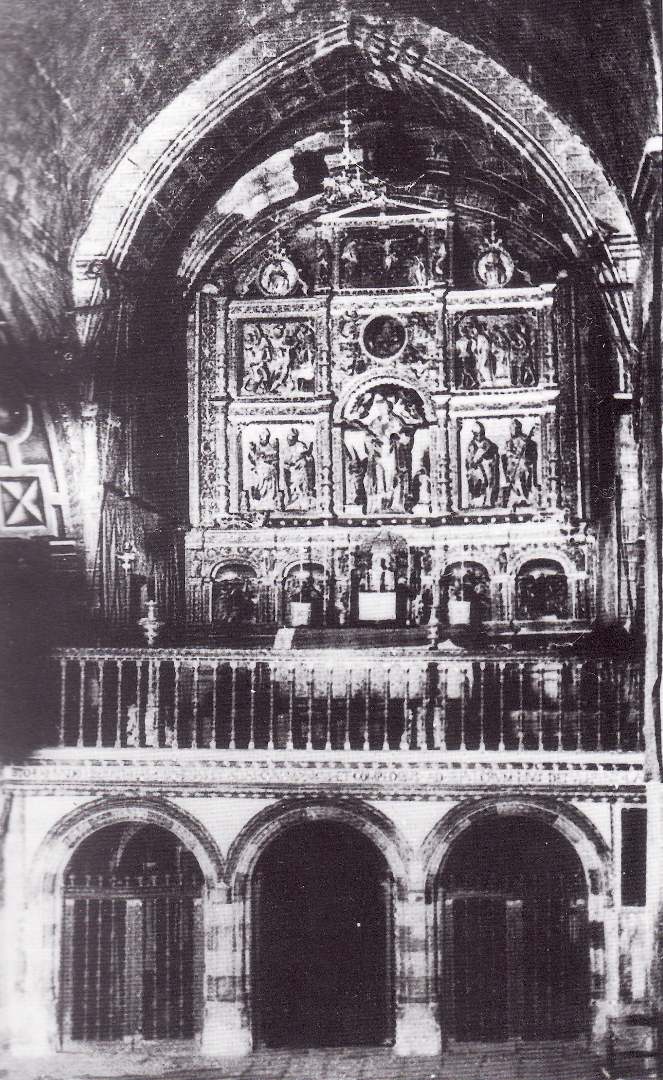 Retaule major de la Catedral de Roda d'Isàvena (Ribagorça), obra de Gabriel Yoli de 1536, i destruït el 1936 a la guerra civil espanyola.